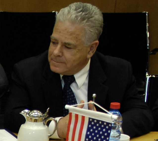 Efraim Sneh